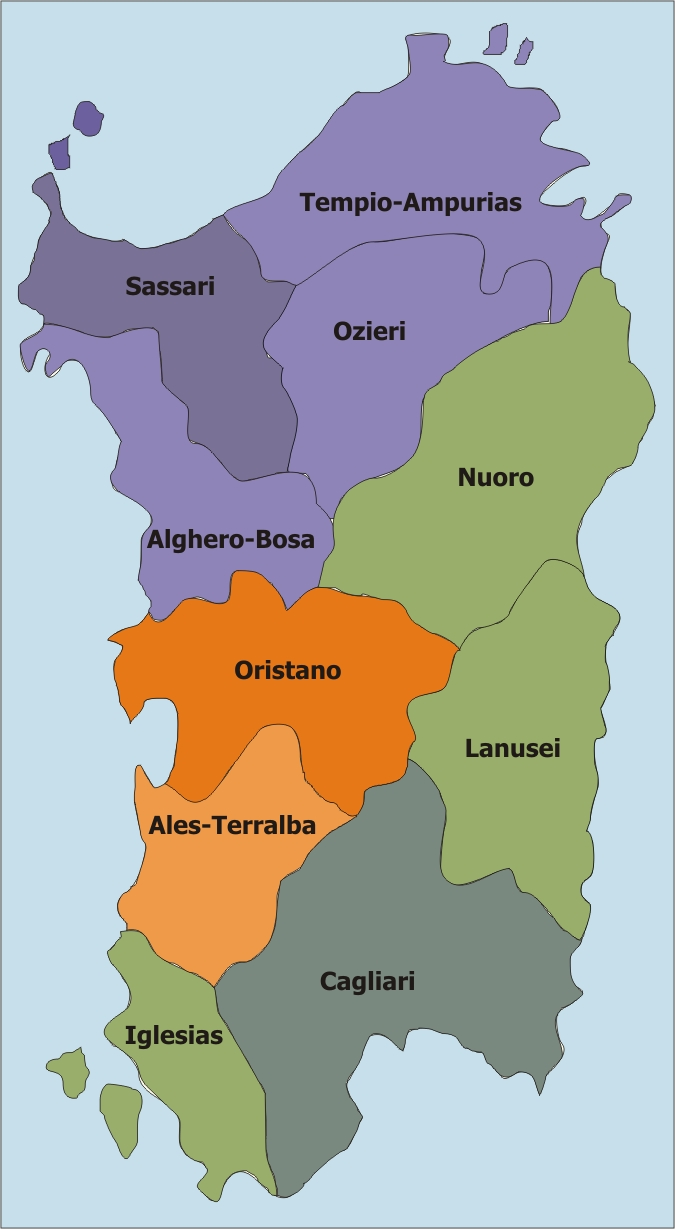 Mapa de la regió eclesiàstica de Sardenya